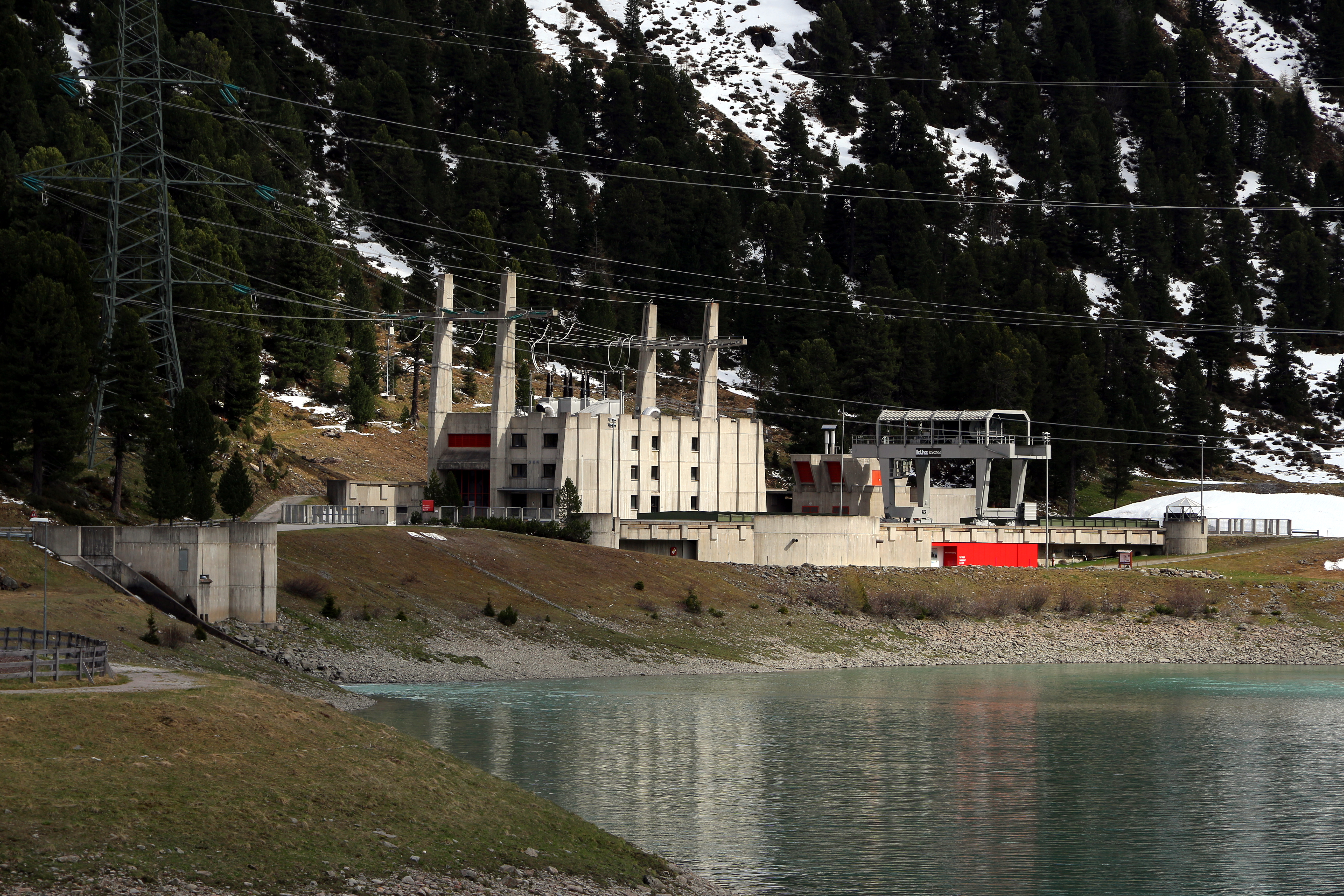 Das Kraftwerk Kühtai in der Gemeinde Silz, Tirol.